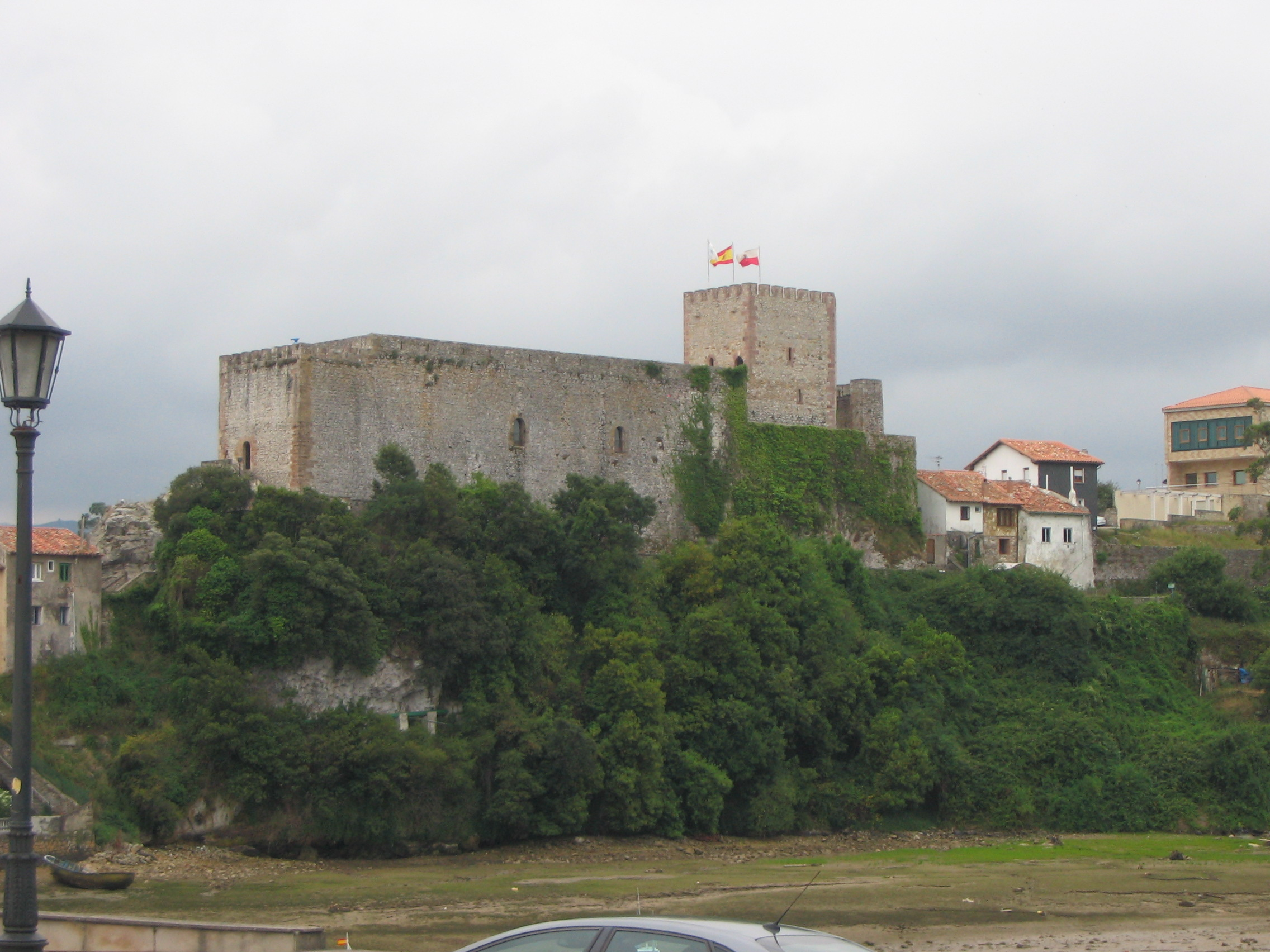 Duke of Estrada's Castle. San Vicente de la Barquera, Cantabria, Spain